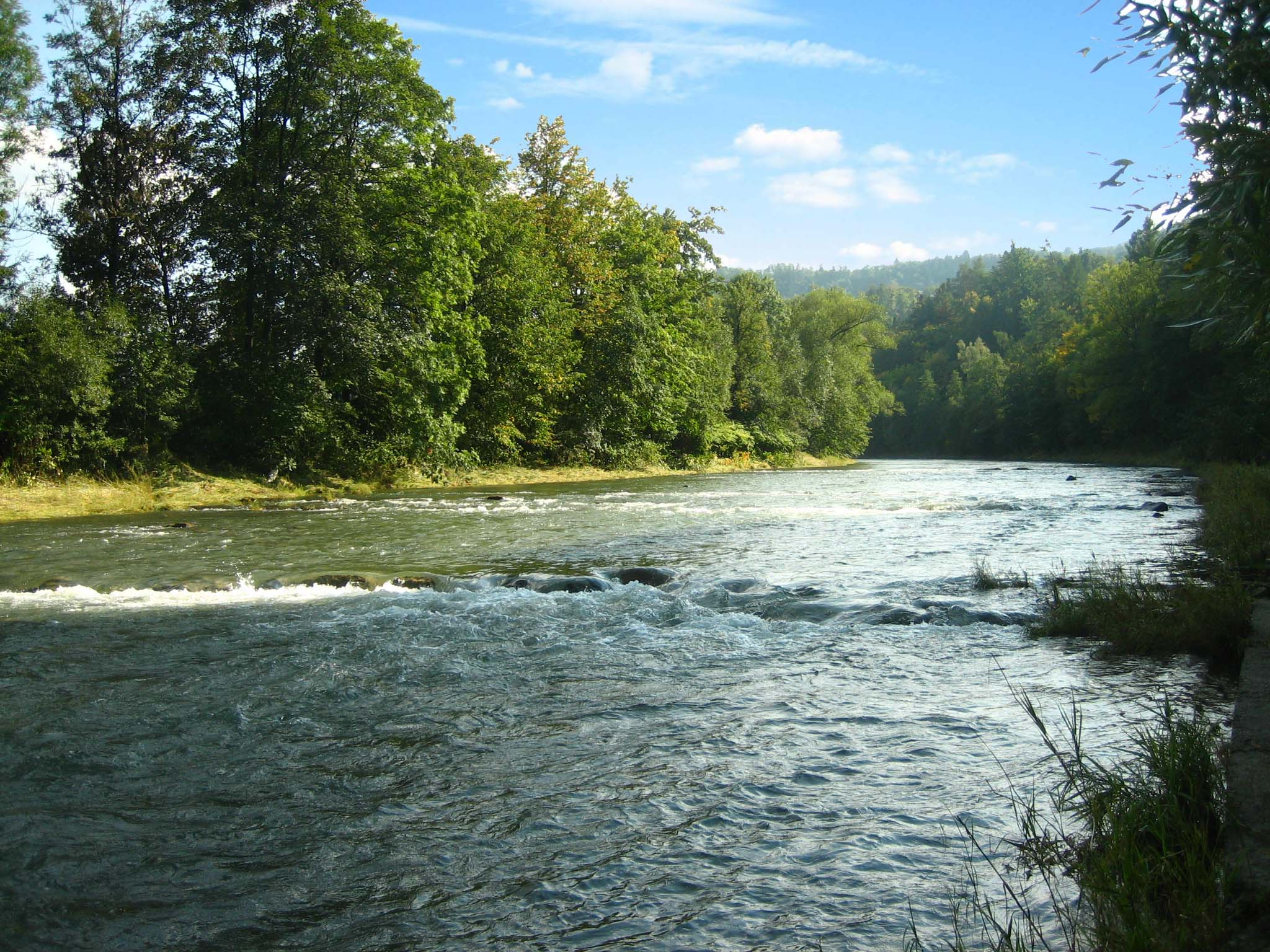 Vsetínská Bečva pod lesem nad obcí Poličná